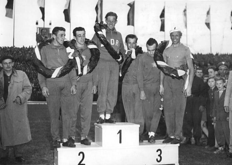 VIII. Friedensfahrt, DDR-Mannschaft Zentralbild CAF-V Bey-Ho 18.5.1955 - VIII. Internationale Radfernfahrt Prag-Berlin-Warschau. UBz: Die strahlenden Sieger der VIII. Internationalen Radfernfahrt für den Frieden: Gustav Adolf Schur (DDR), der Gesamt-Einzelsieger neben der Mannschaft der CSR, die in der Gesamt-Mannschaftswertung den 1. Platz belegte.